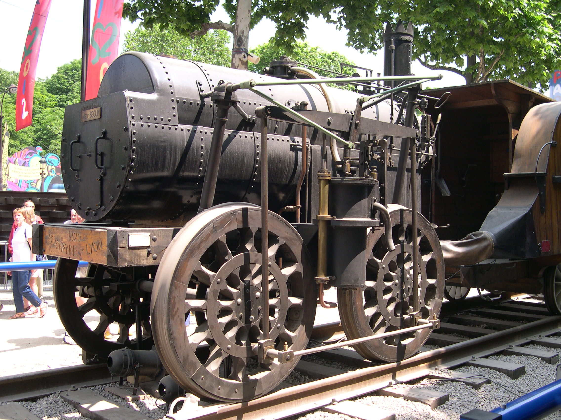 France Paris Champs Elysées Expo Train capitale 2003 Locomotive Seguin Auteur : GIRAUD Patrick